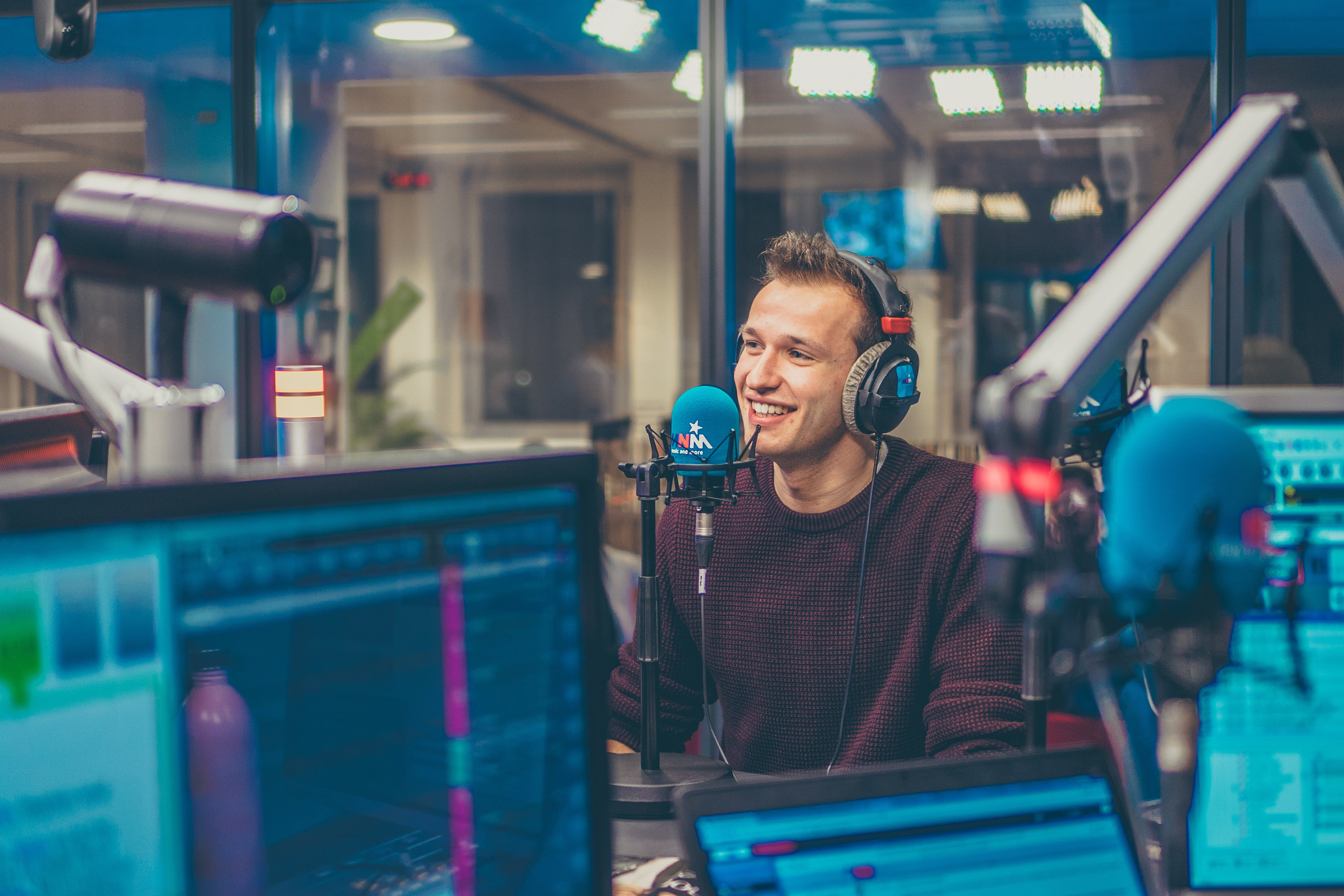 Michiel De Meyer in de studio van MNM